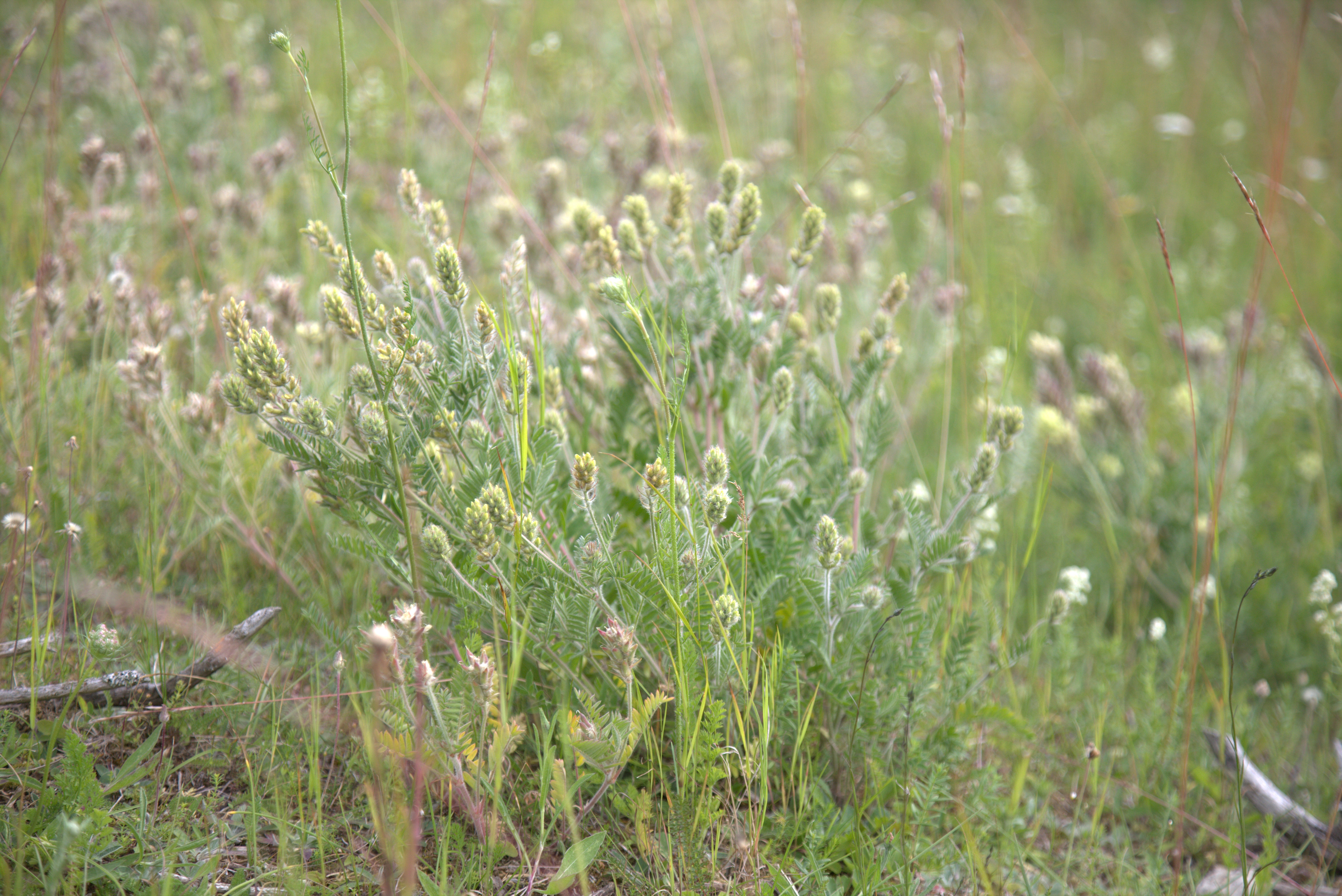 Luddvedel (Oxytropis pilosa) i naturreservatet Kastad kulle.